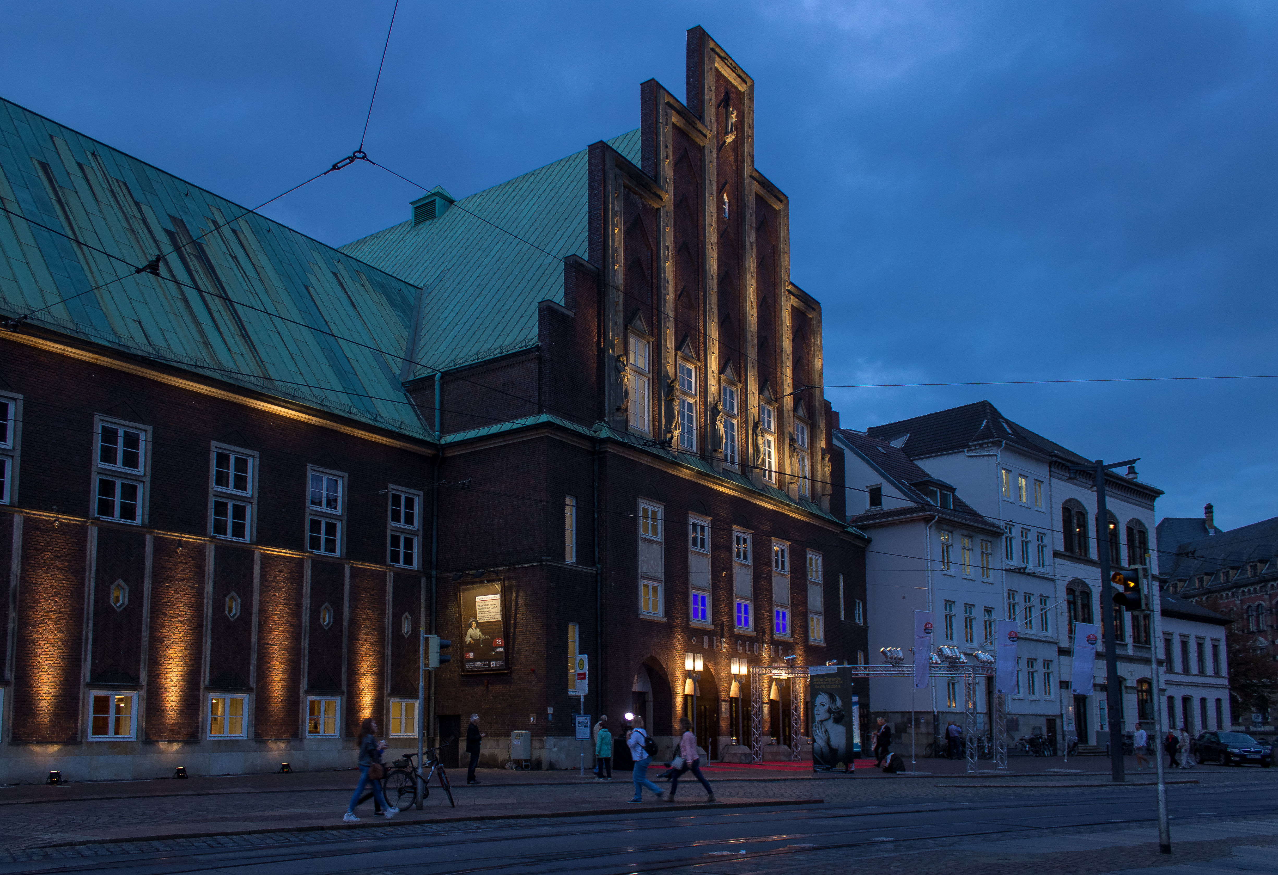 Die Glocke, Kapitelhaus der Domgemeinde in Bremen, Domsheide 6Das abgebildete Objekt ist ein geschütztes Kulturdenkmal in der Freien Hansestadt Bremen, mit der Nr. 0179,T beim Landesamt für Denkmalpflege registriert.